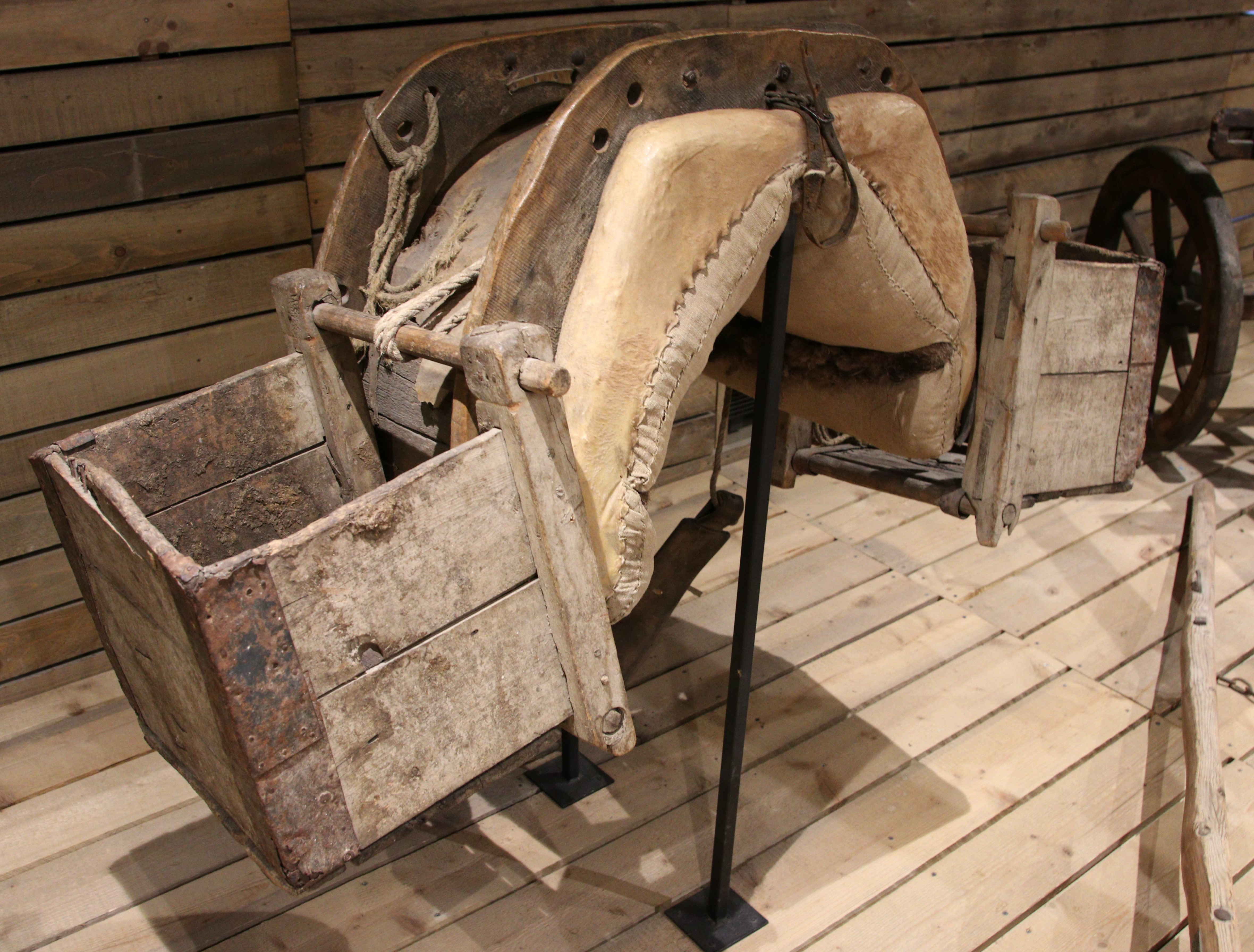 22. Bât, Besse (Isère), placé sur le dos de l(âne ou du mulet pour le transport ds charges; 23. Banastes, Saint-Véran (Hautes-Apes), fixées sur le bât, ces caisses à fonds mobiles sont utilisées pour transporter et déverser le fumier dans les champs. Exposition de longue durée "Gens de l'alpe" au Musée dauphinois, Grenoble.